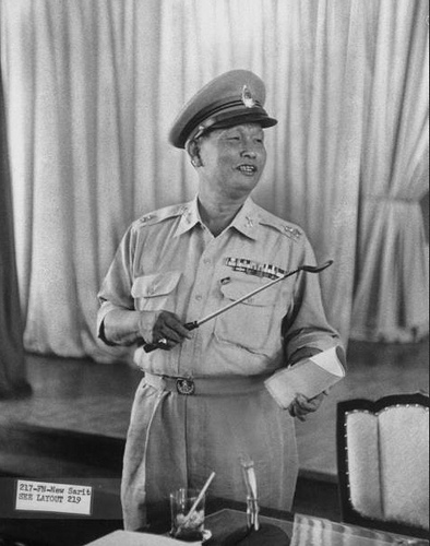 สฤษดิ์ ธนะรัชต์ก่อนปี ค.ศ. 1963